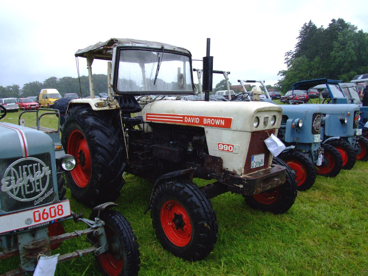 David Brown 990 GAF mit 54 PS, Baujahr 1969